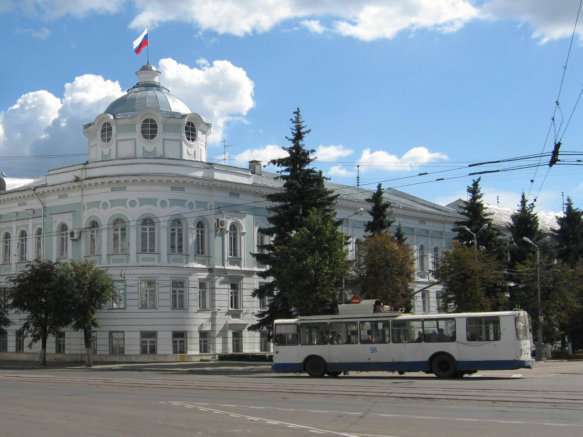 Троллейбус на Советской площади (Тверь)